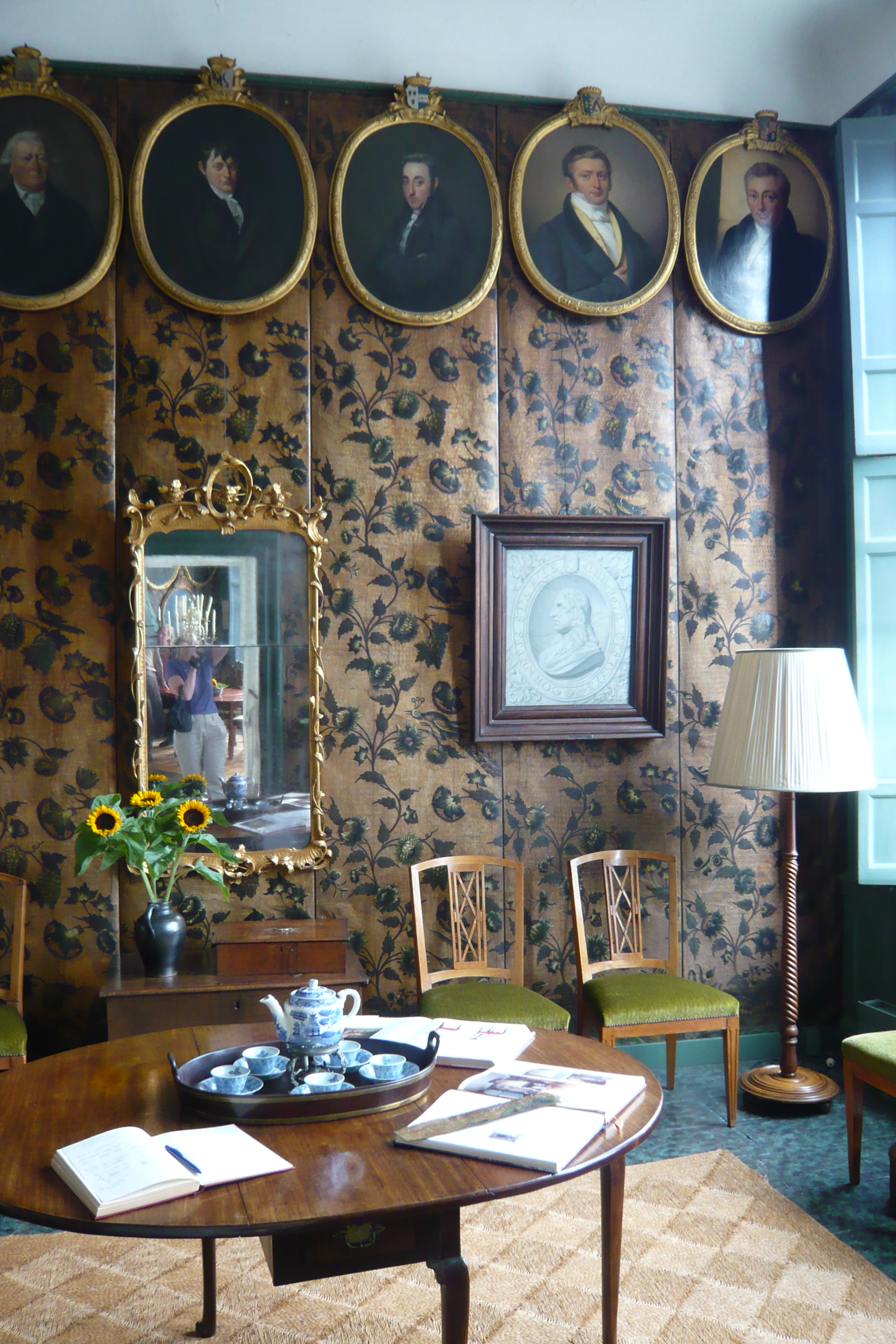 Hofje van Noblet, Haarlem